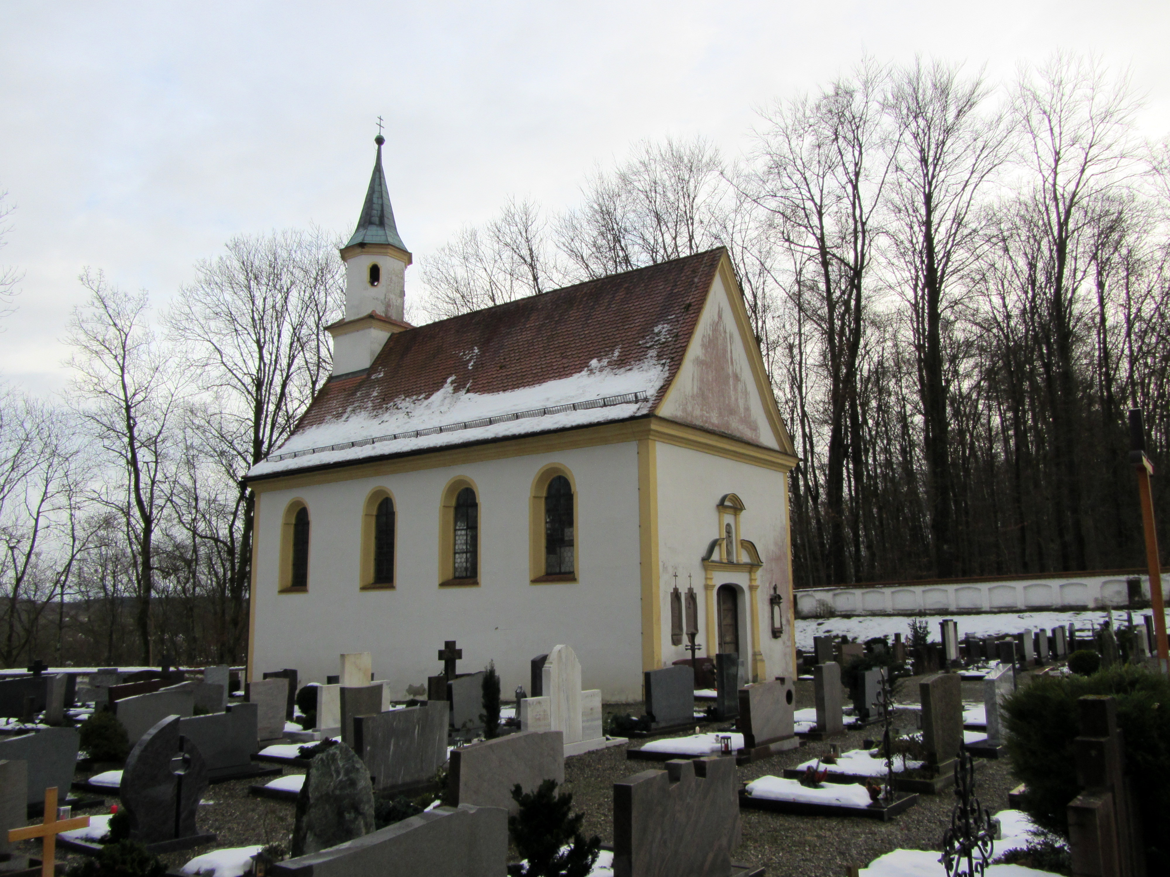 Gottesackerkapelle (Gutenzell)- Kriegerdenkmal 1. Weltkrieg